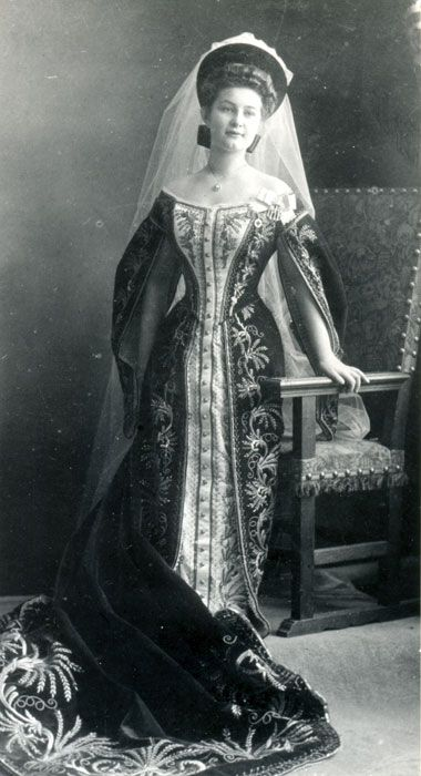 Екатерина Сергеевна Хвостова (1888— после 1938)